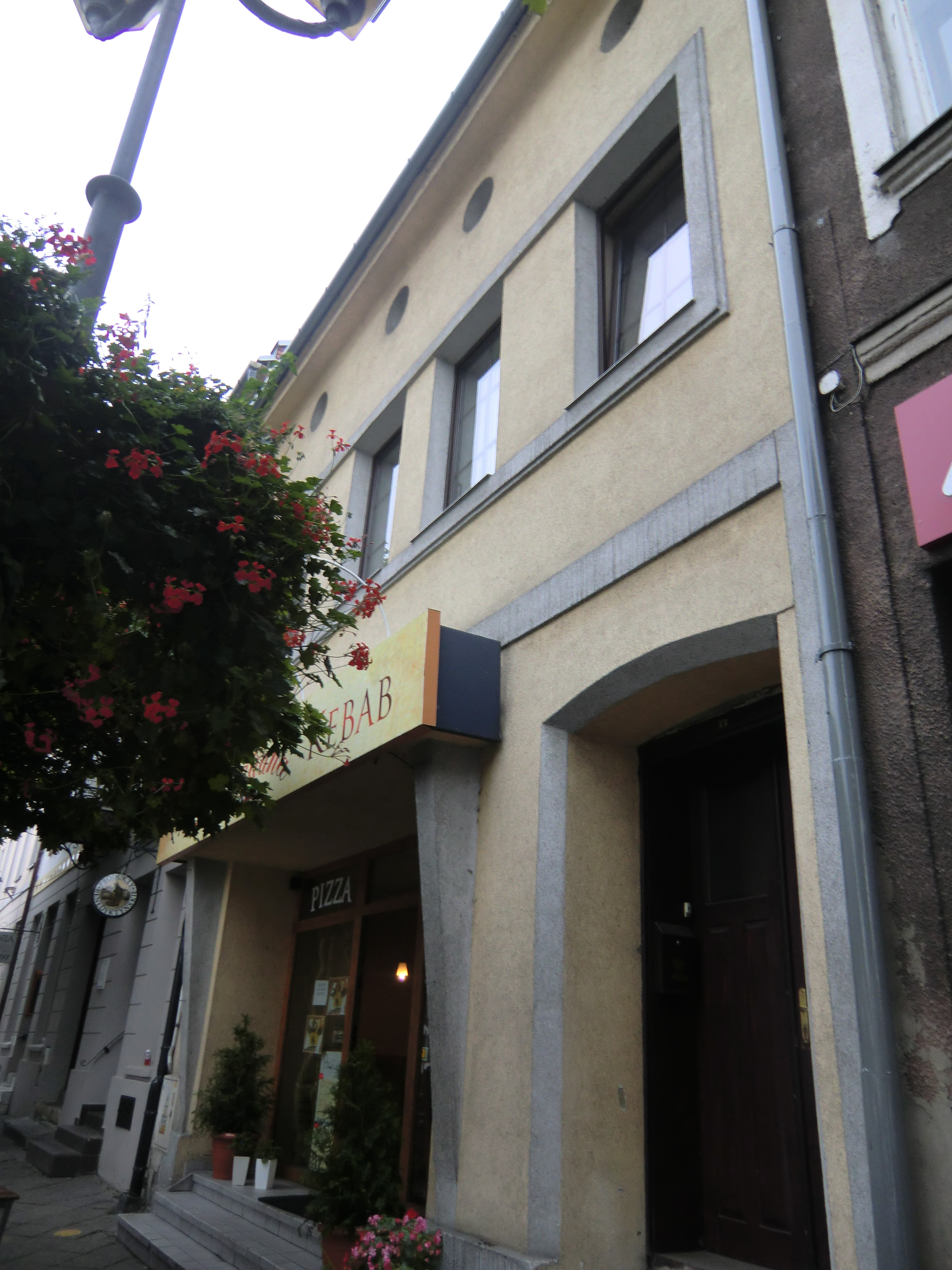 Żywiec, Rynek 17